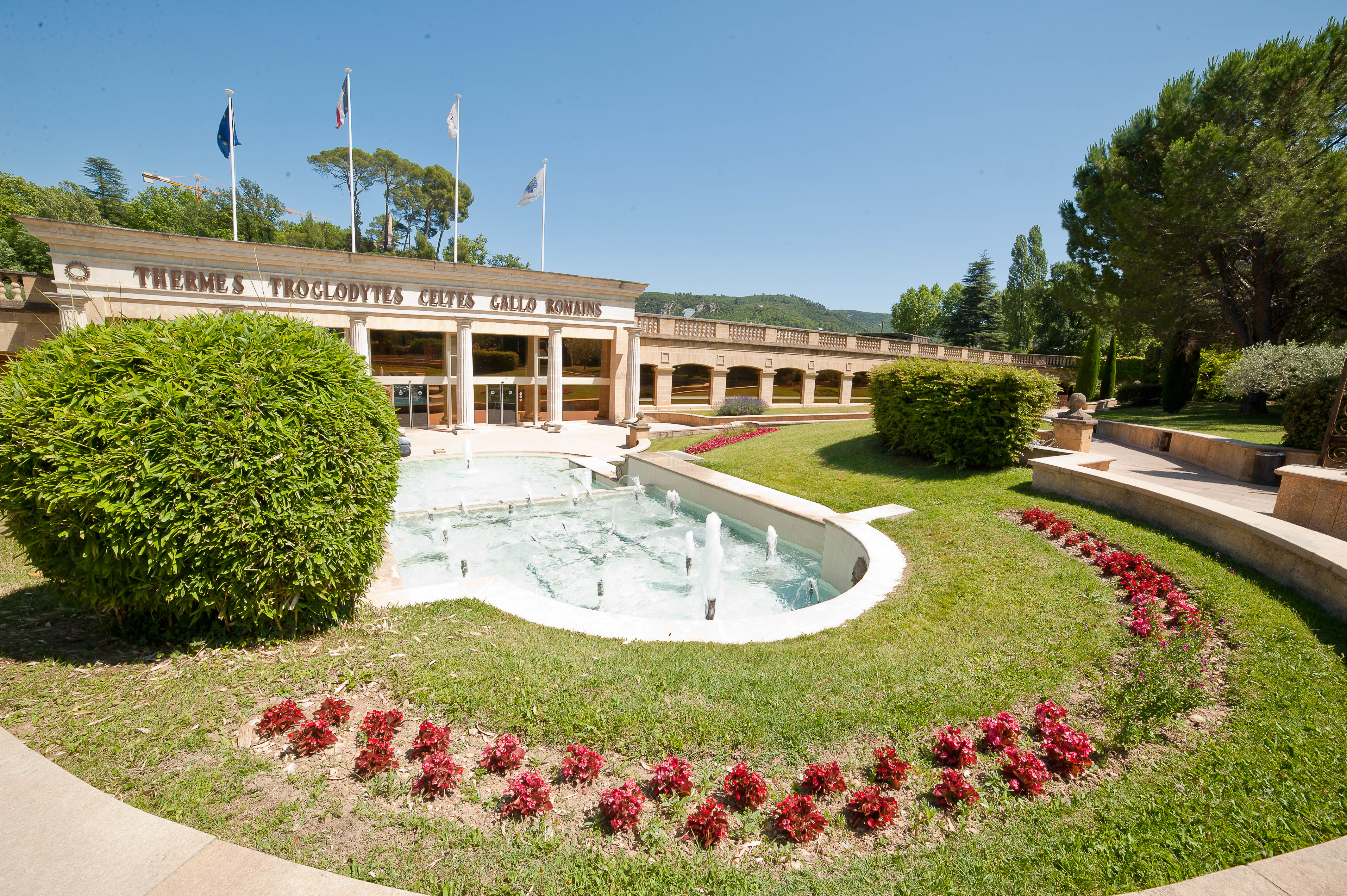 Thermes et parc de Gréoux-les-Bains